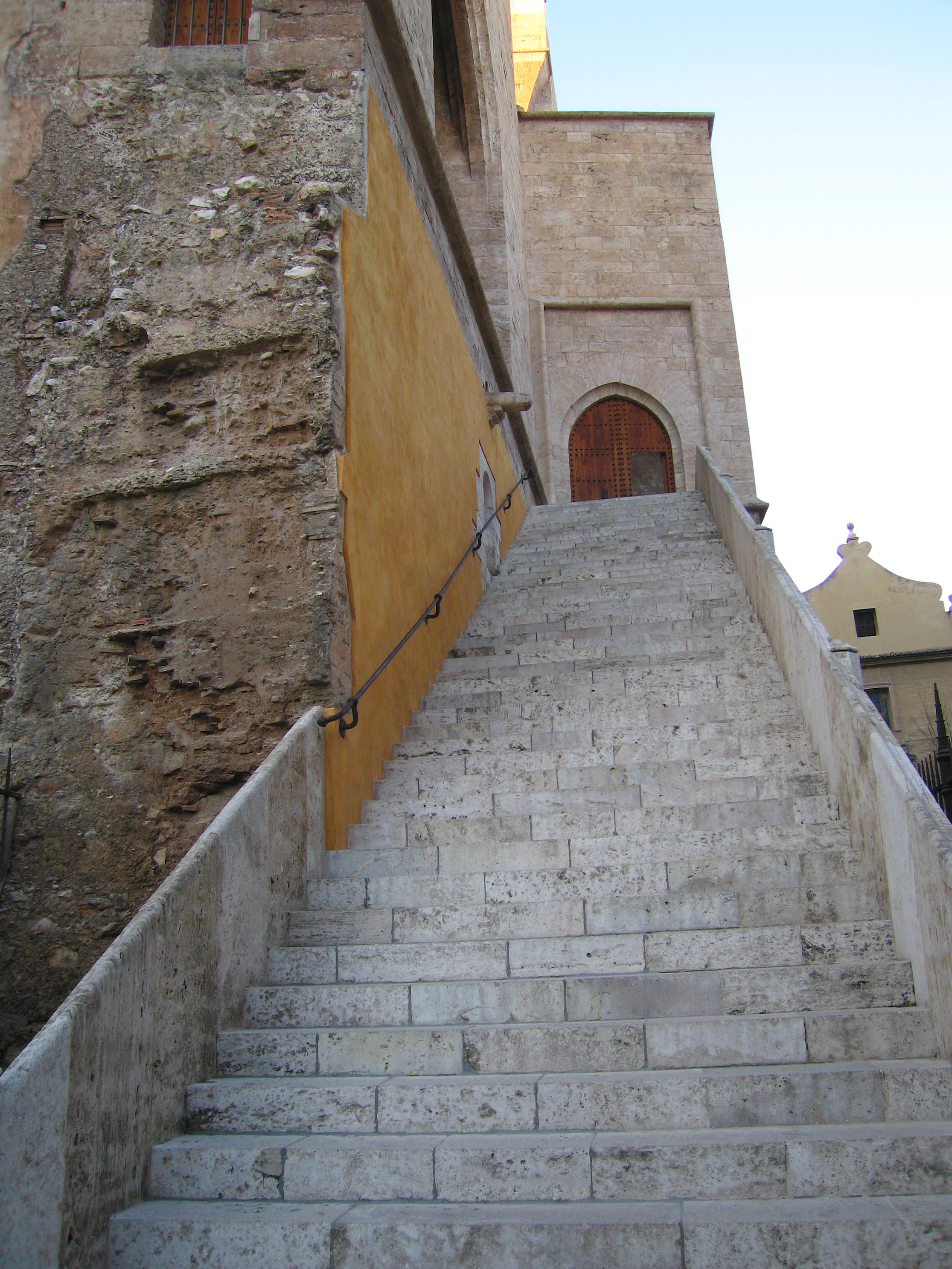 Escala d'accés a les Torres de Quart (València)